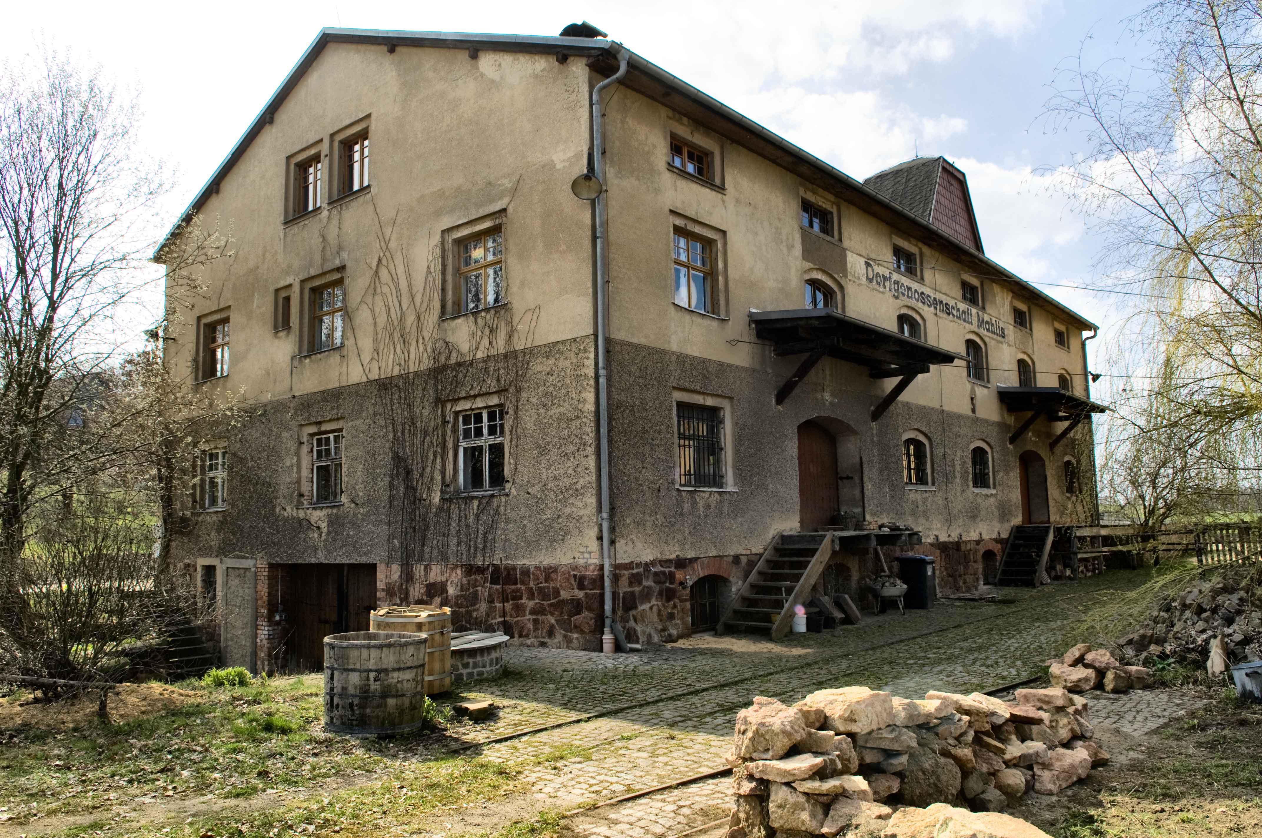 Kornhaus der Genossenschaft um 1920 in Mahlis bei Wermsdorf